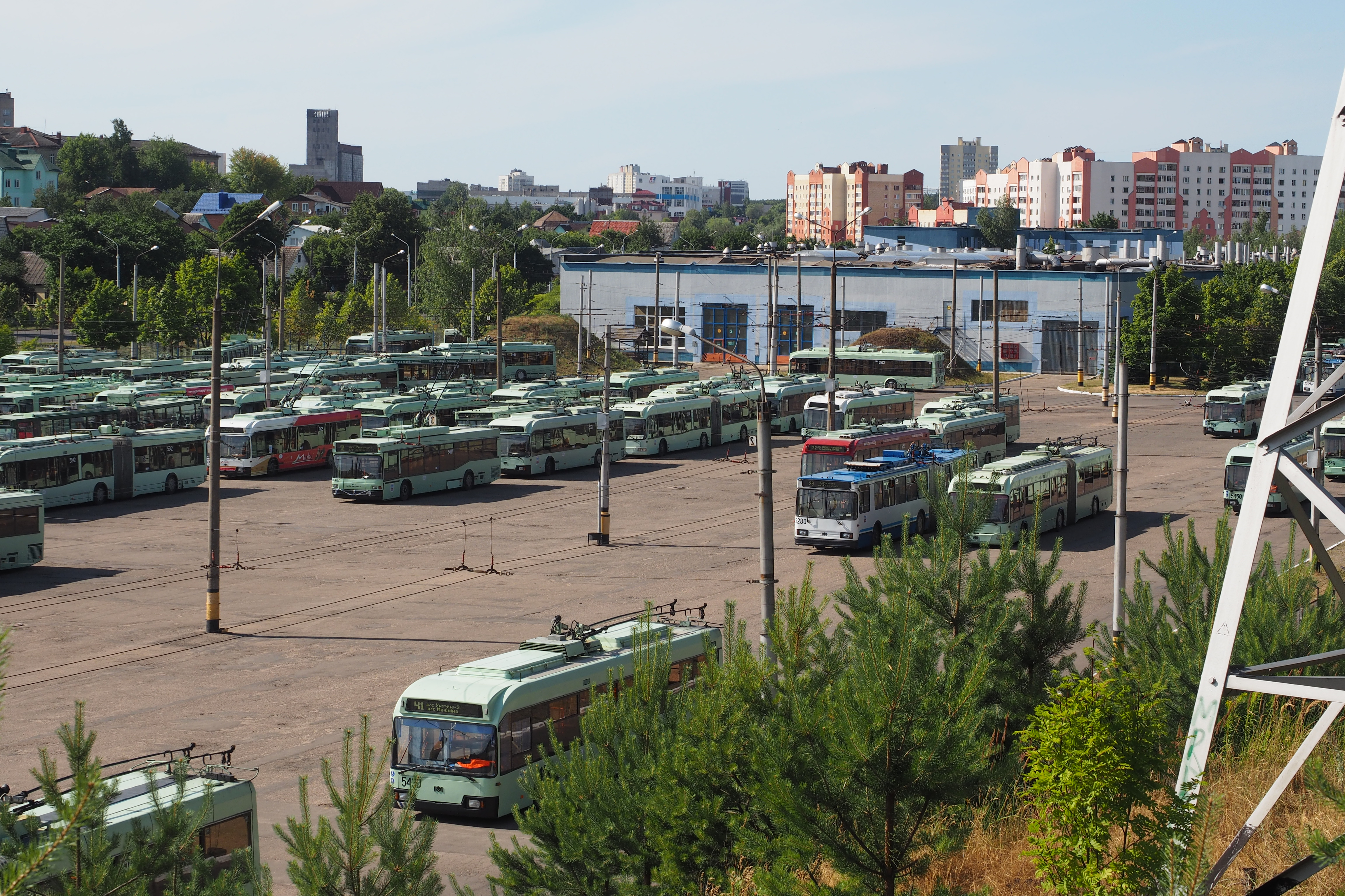 Minsk, Belarus